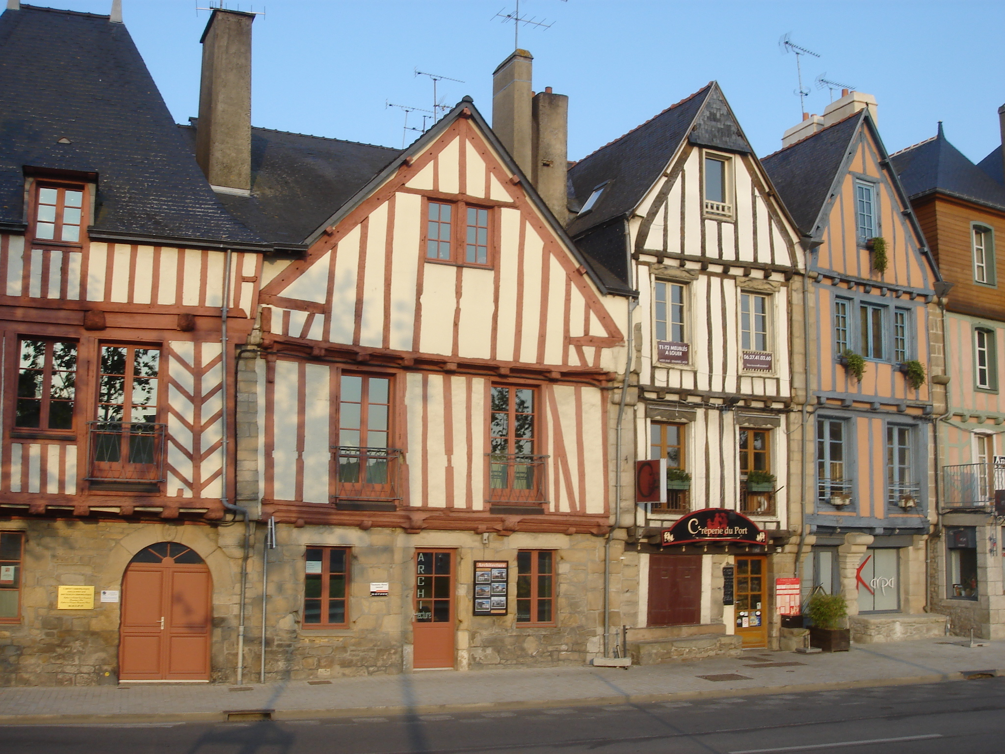 Maisons médiévales XVIe, rue du Port, promenade de Rabaines, Vannes, Bretagne, France